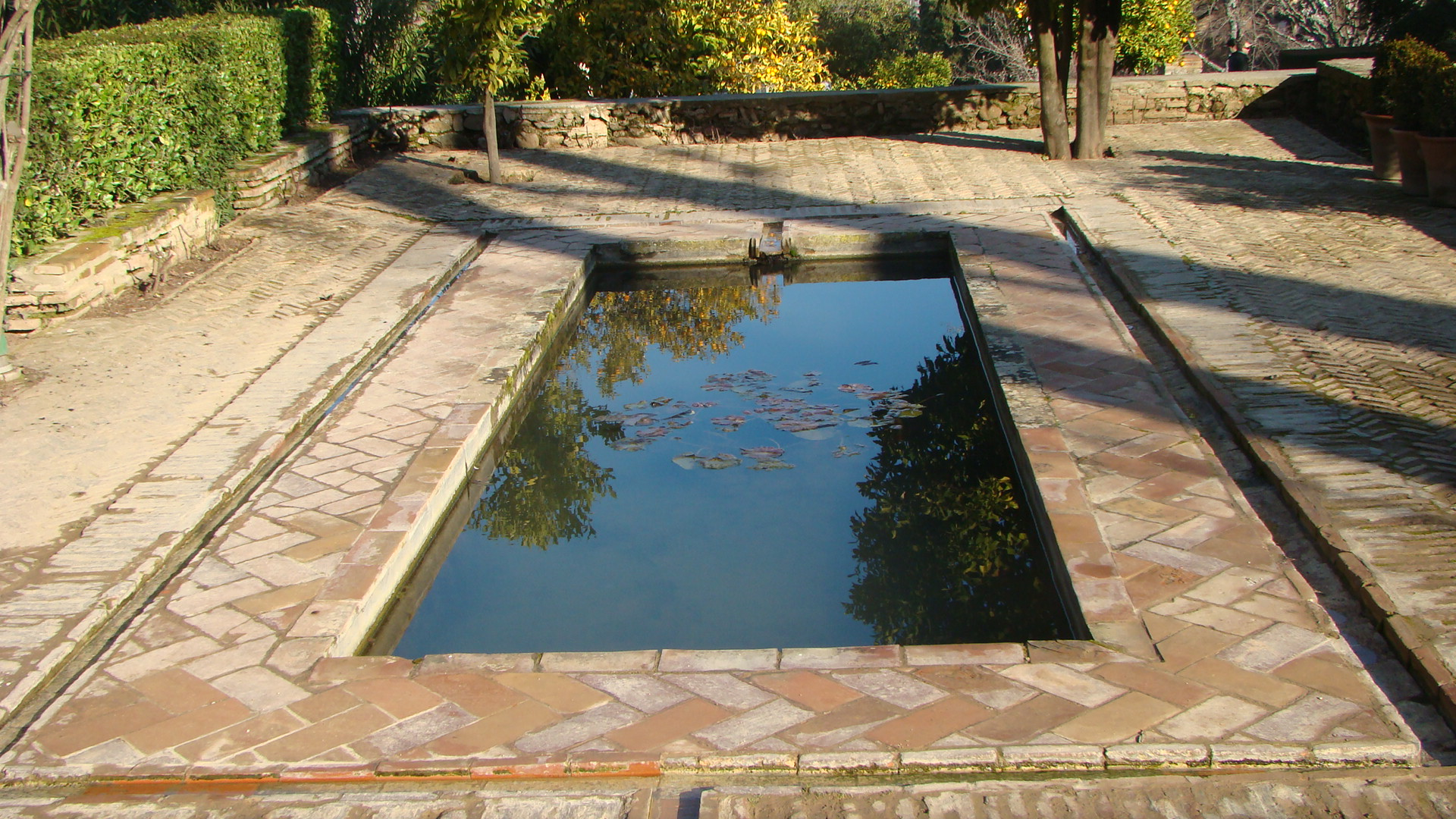 Alberca de las ruinads del Palacio de Yusuf III, en la Alhambra (Granada)